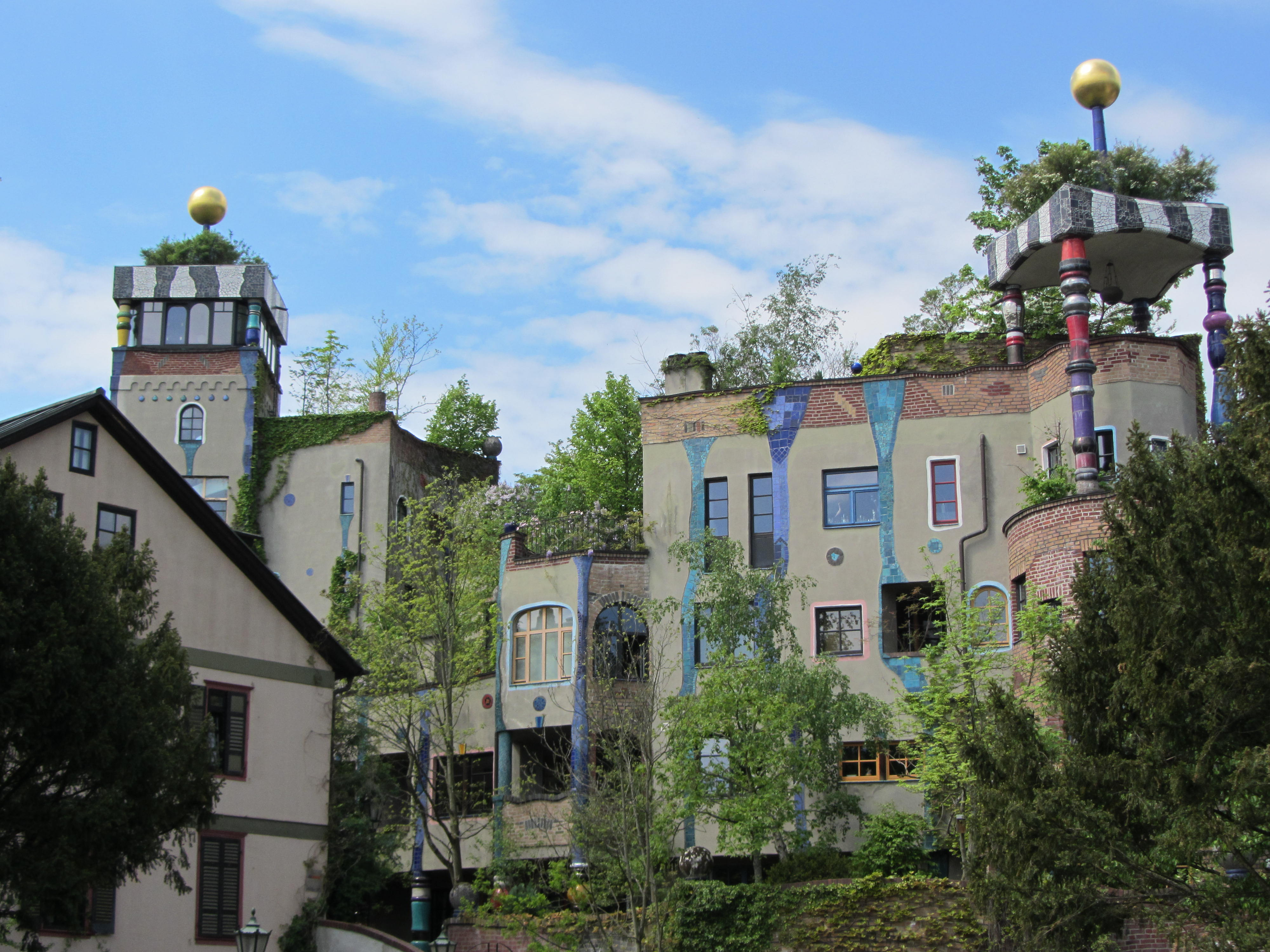 DasHunderrtwasserhaus in Bad Soden am Taunus